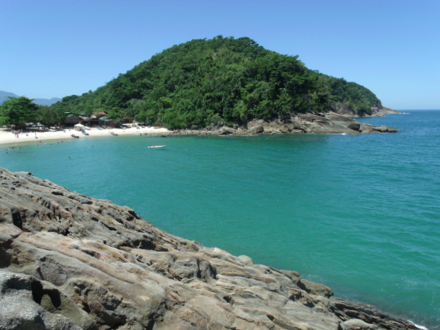 Praia do Meio - Trindade/RJ